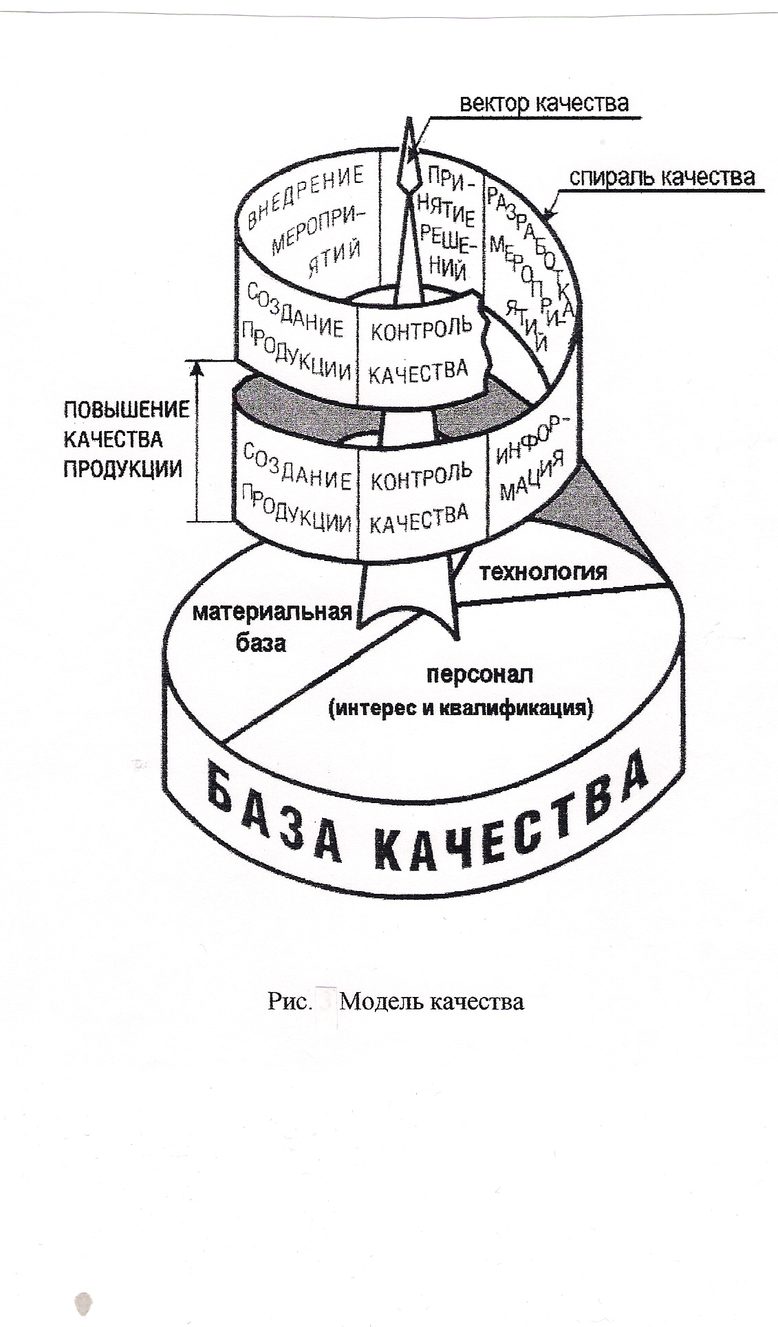 Модель качества показывает зависимость качества от факторов, влияющих на качество